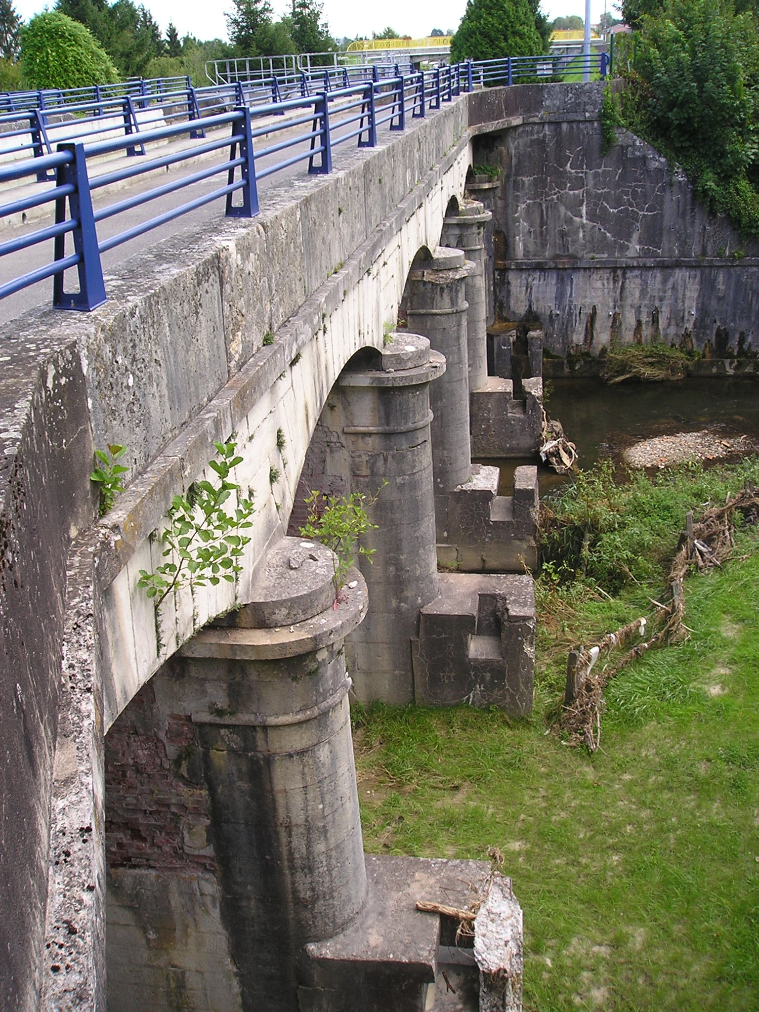 Wolfersdorf (Frankreich), Kanalbrücke